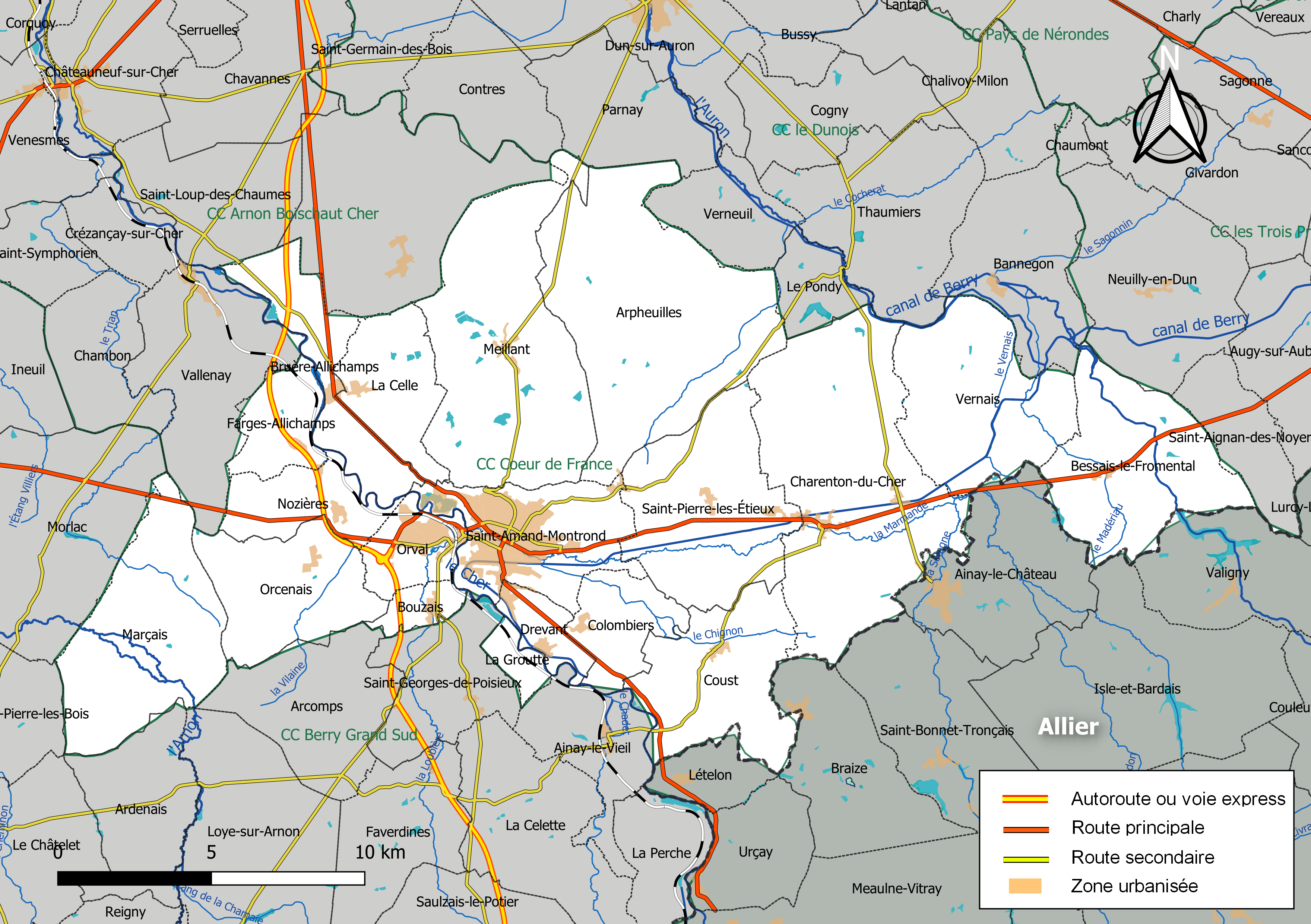 Carte géographique de la communauté de communes du Cœur de France, département du Cher, France. Composition au 1er janvier 2019.